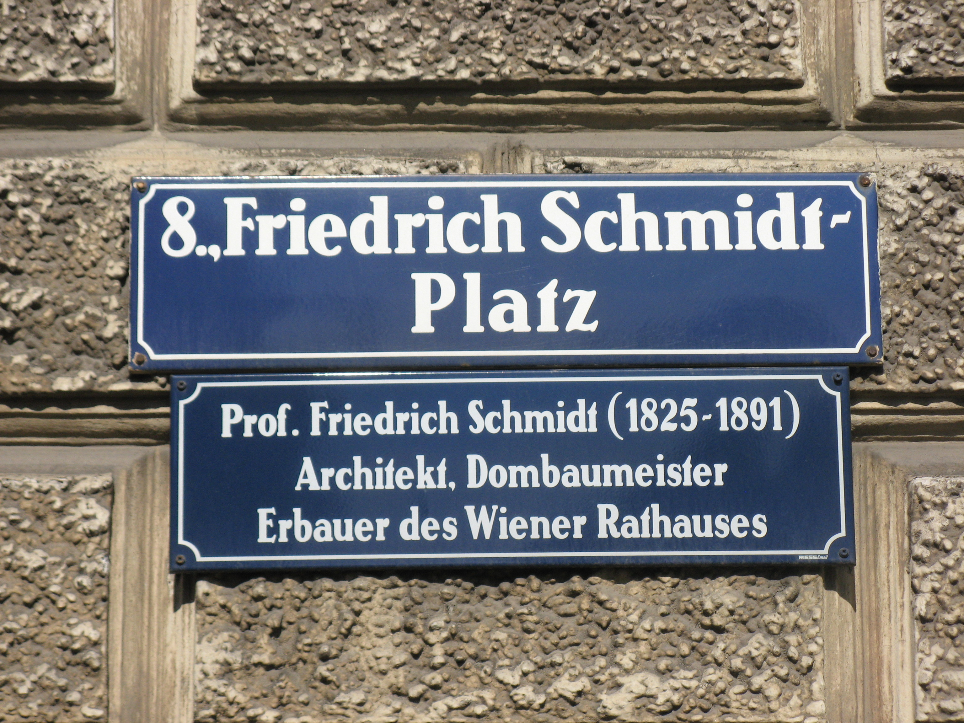 Straßentafel mit Zusatzschild Friedrich-Schmidt-Platz, Wien-Josefstadt